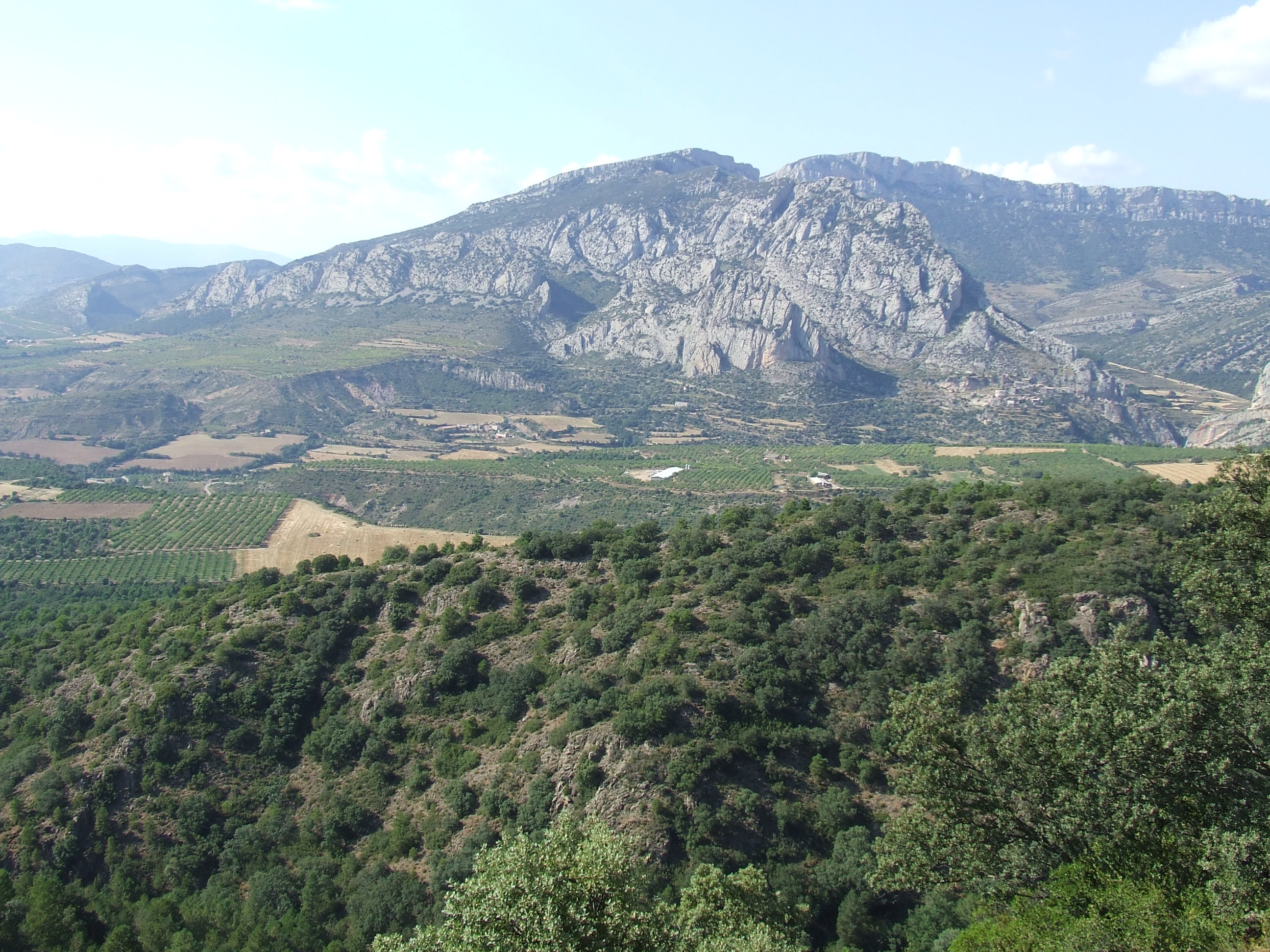 Vista de la vall d'Abella, amb el sector muntanyós a la dreta i el pla a l'esquerra.